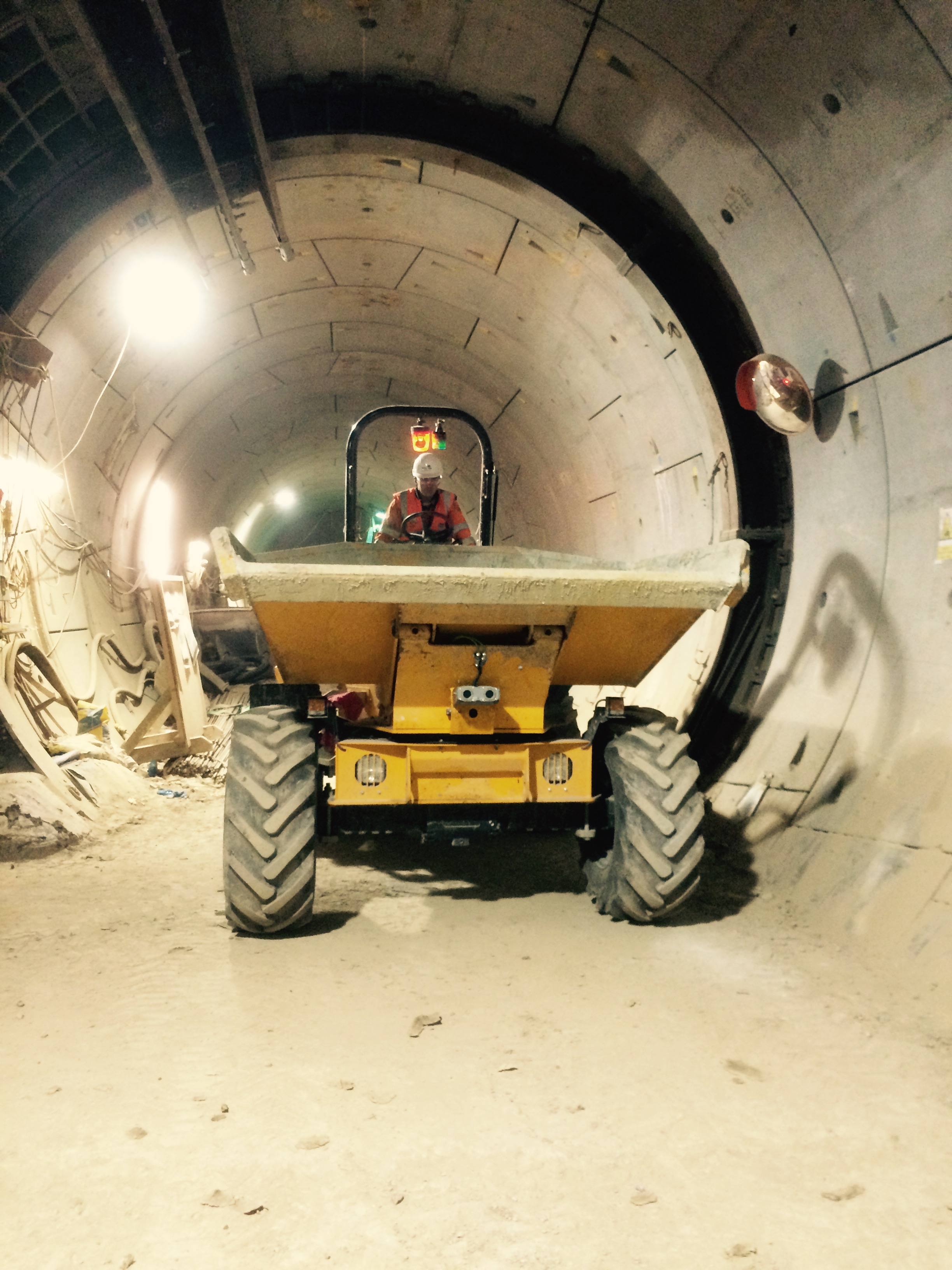 Tombereau circulant dans un tunnel en construction